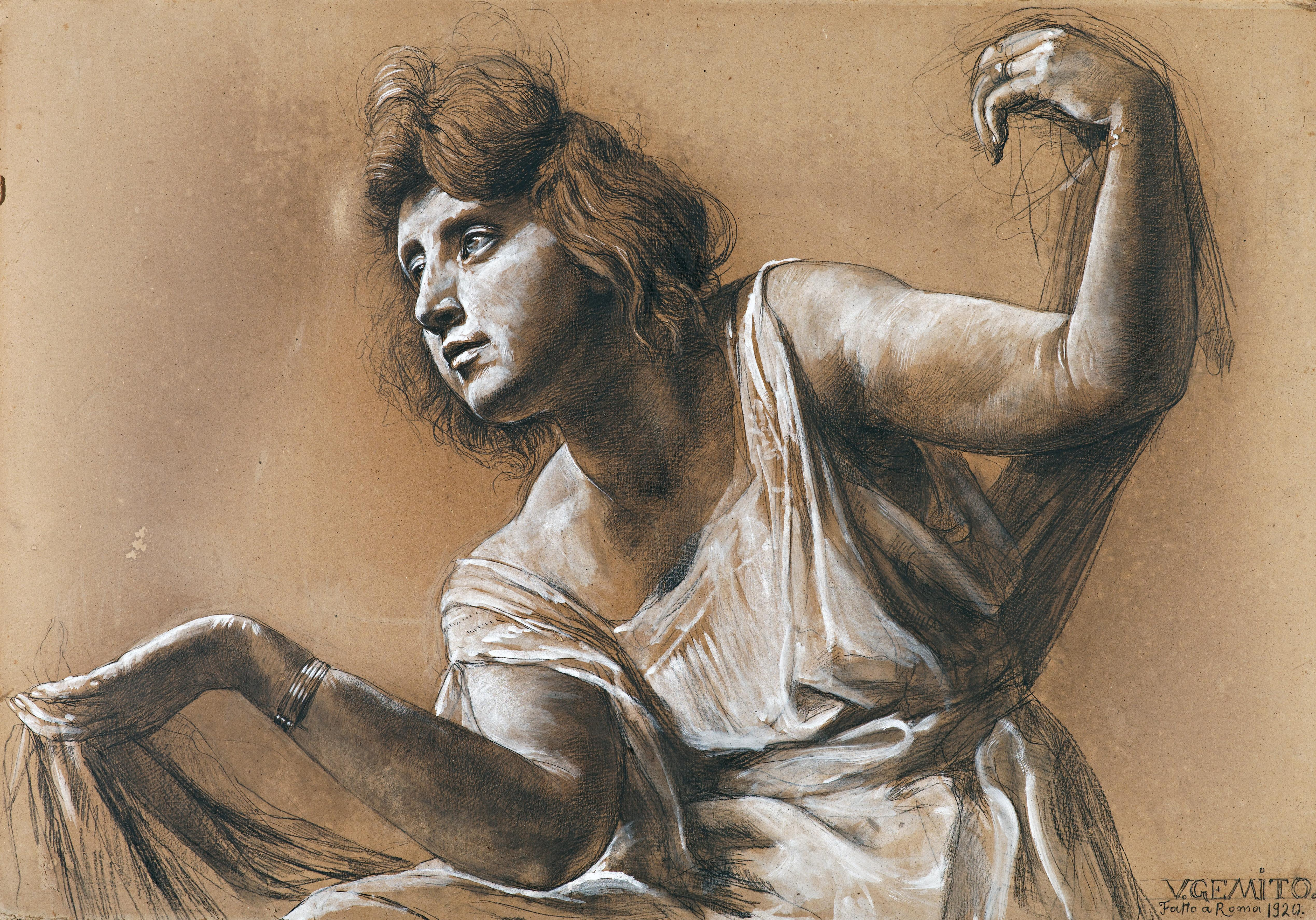 Bildnis der Marchesa Giulia Albani, signiert, datiert und bezeichnet V. Gemito. Fatto a Roma 1920., schwarze Kreide und Deckweiß auf Karton, 71 x 103 cm